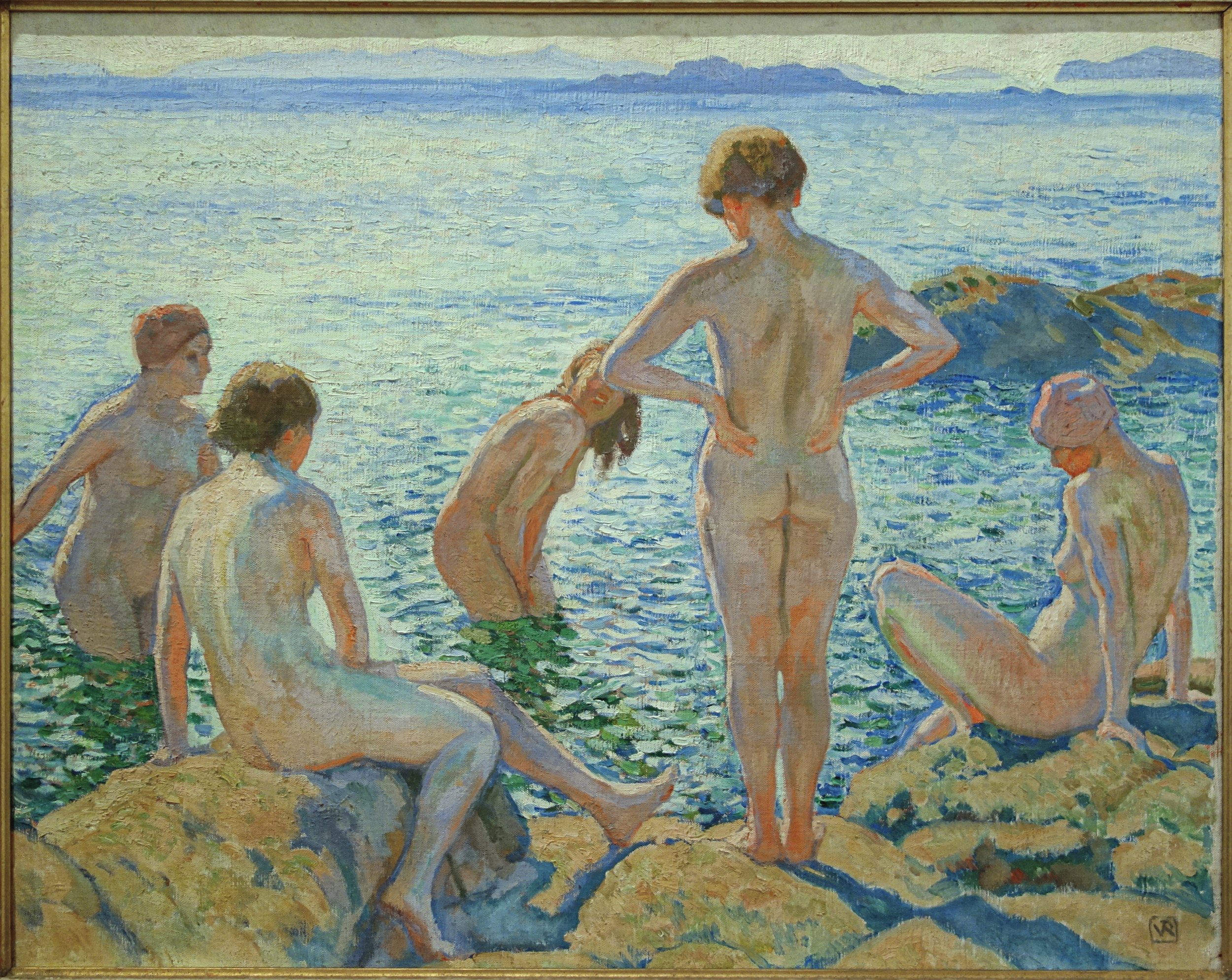 "De baadsters ca. 1920", olieverf op doek door Théo van Rysselberghe (1862-1926); collectie Mu.Zee, Oostende